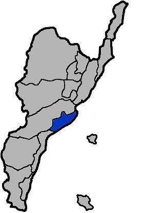 中華民國臺灣省臺東縣臺東市，KJ (talk)繪製。